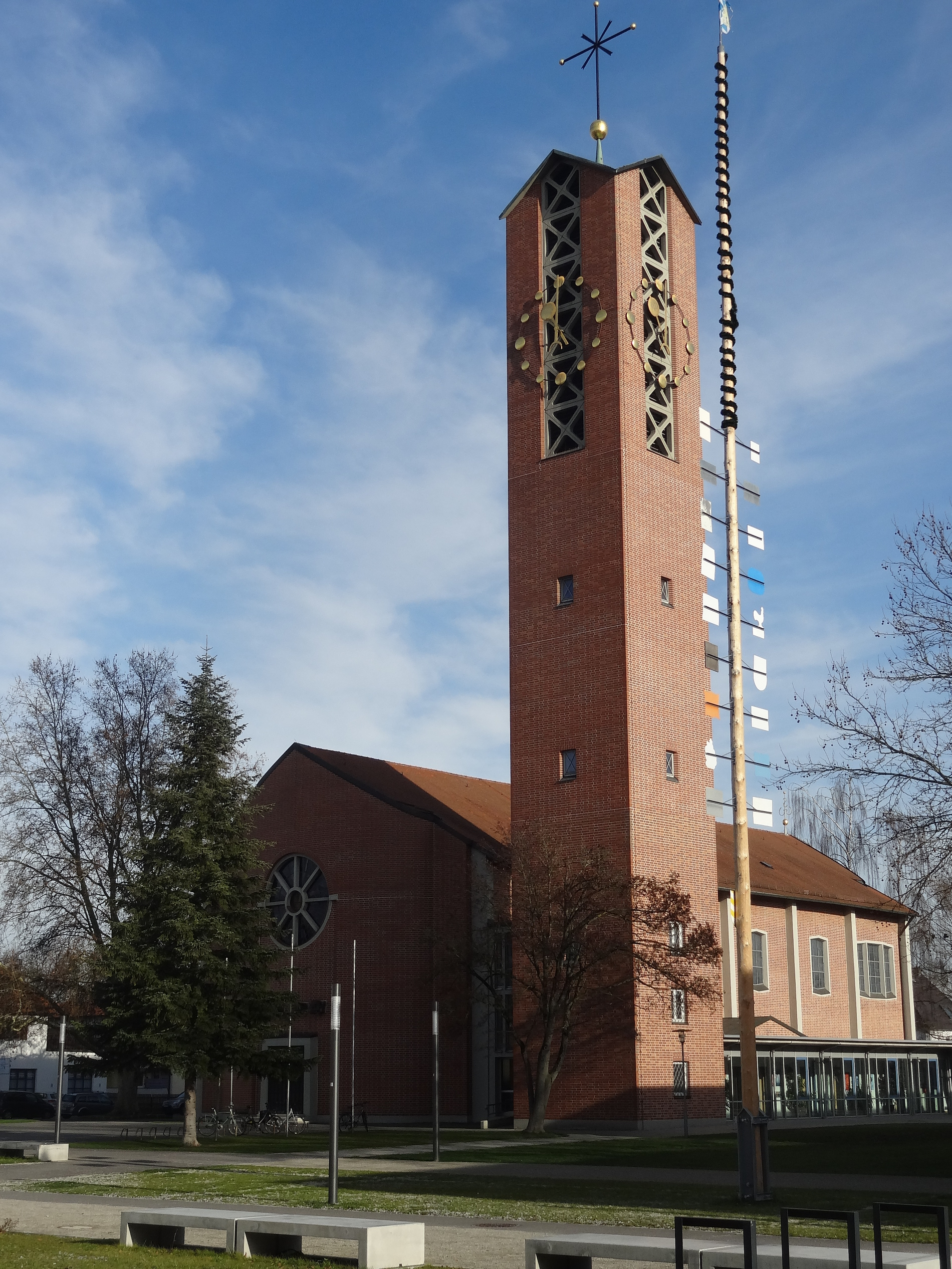 Katholische Pfarrkirche St. Wolfgang in Landshut